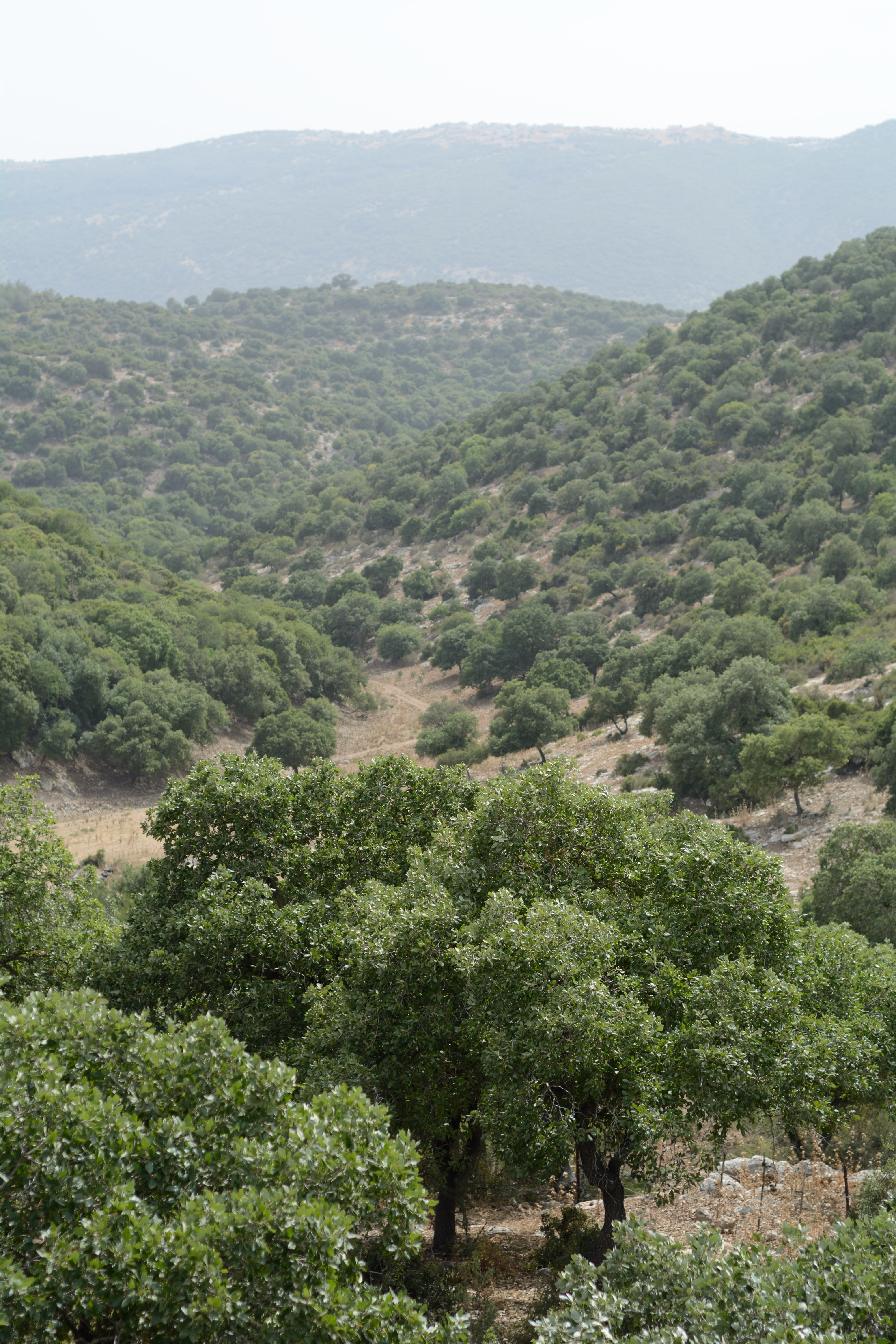 Центральная часть заповедника близ деревни Забайдат.